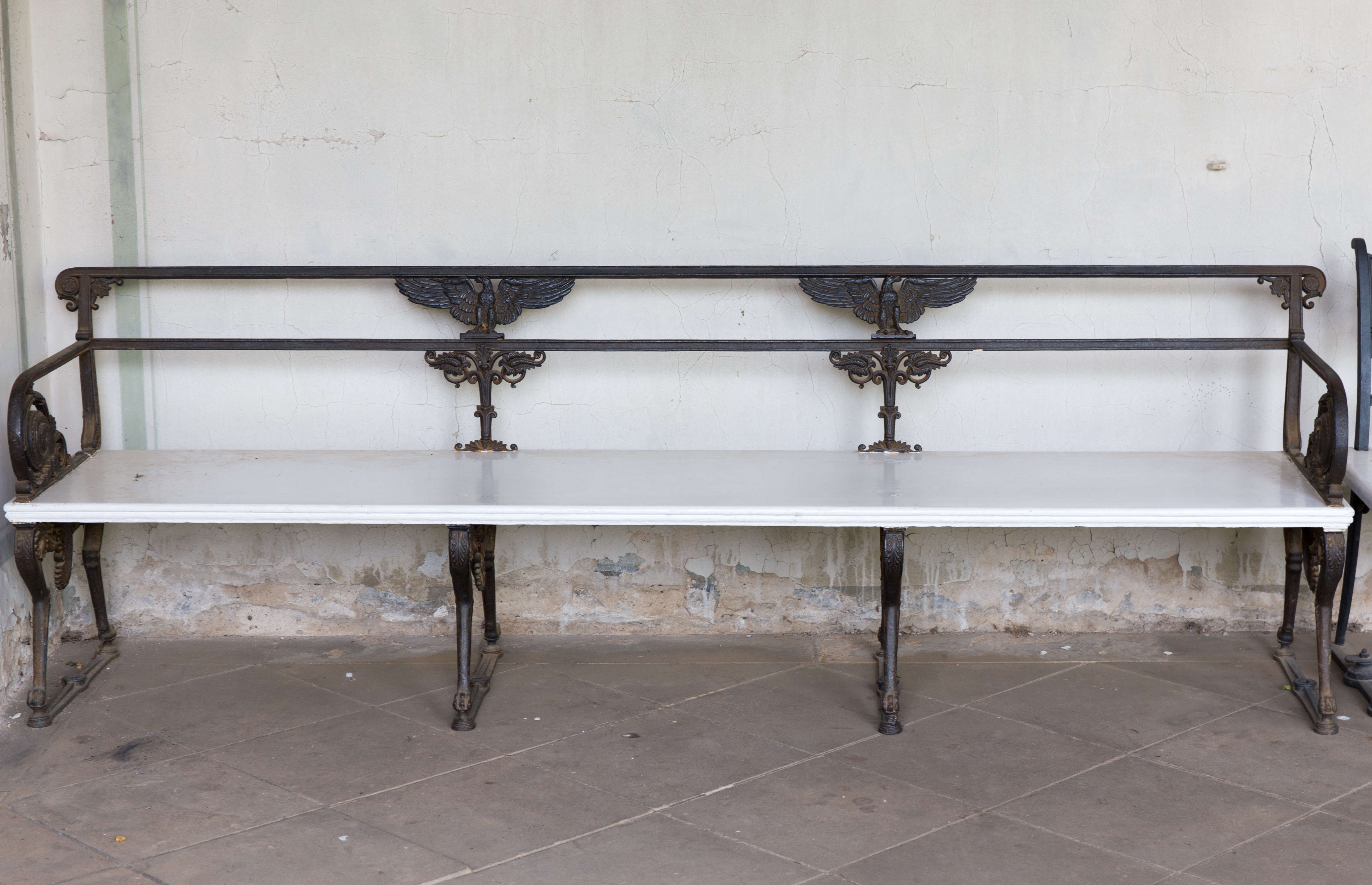 KulTour Parkanlage Sanssouci Römische Bäder Gusseiserne Bank